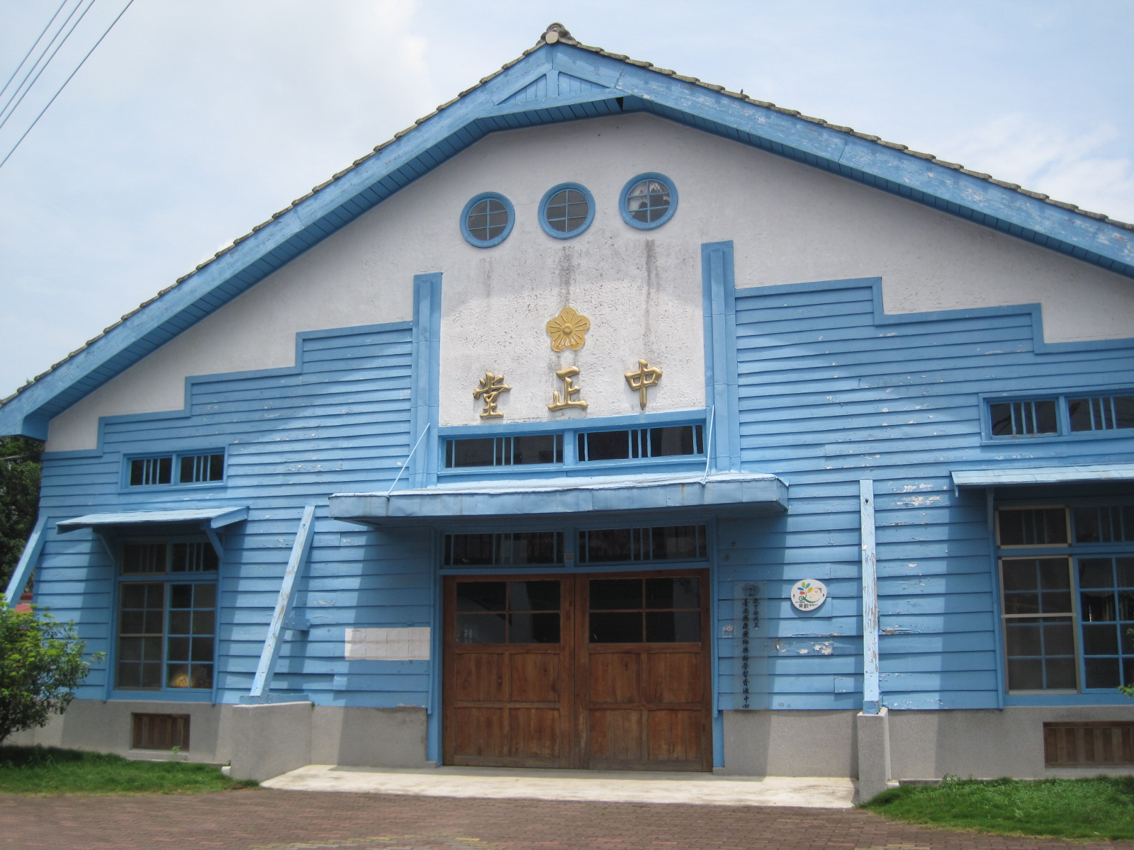 中文（台灣）: 臺灣臺南市後壁區菁寮國小禮堂